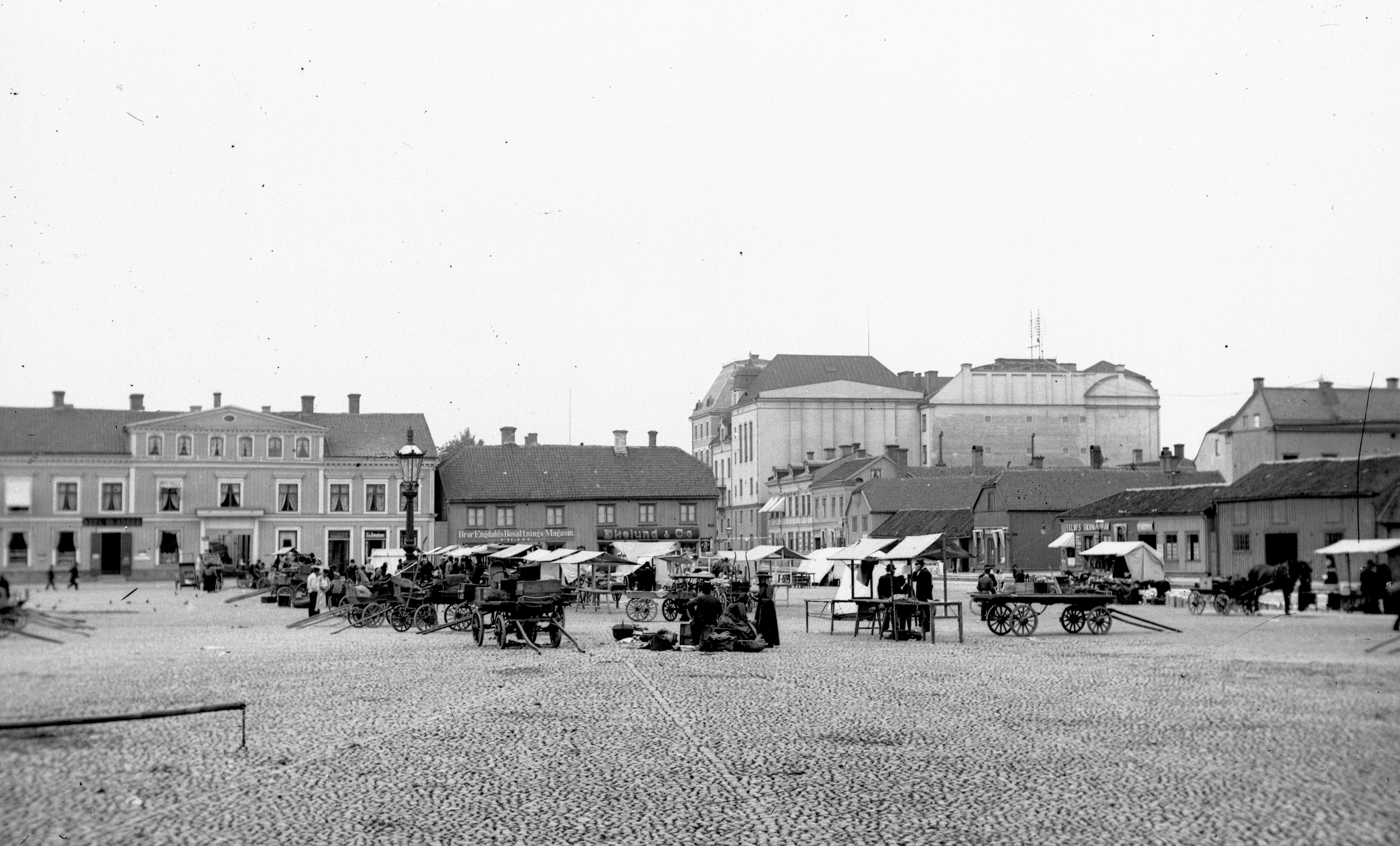 Torgbild från ca 1915